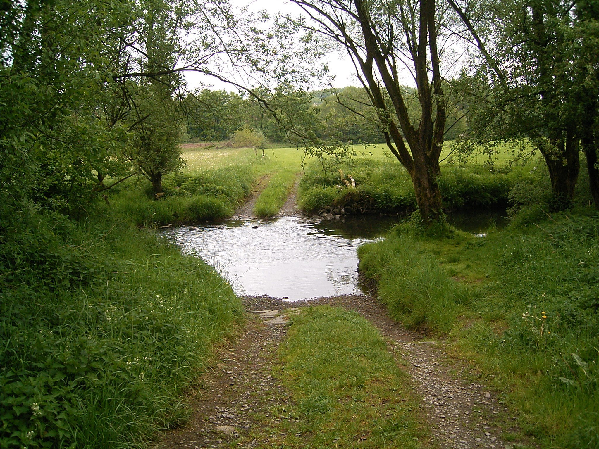 Wupperfurt in Hückeswagen - Hämmern